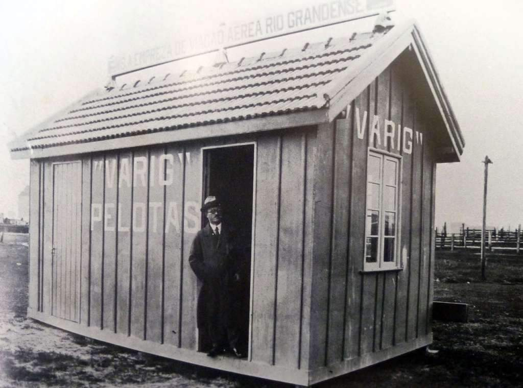 Pelotas – Abrigo de passageiros da Varig na década de 1920.